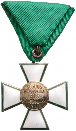 Magyar Érdemkereszt középkeresztjének kisdíszítményének hátoldala